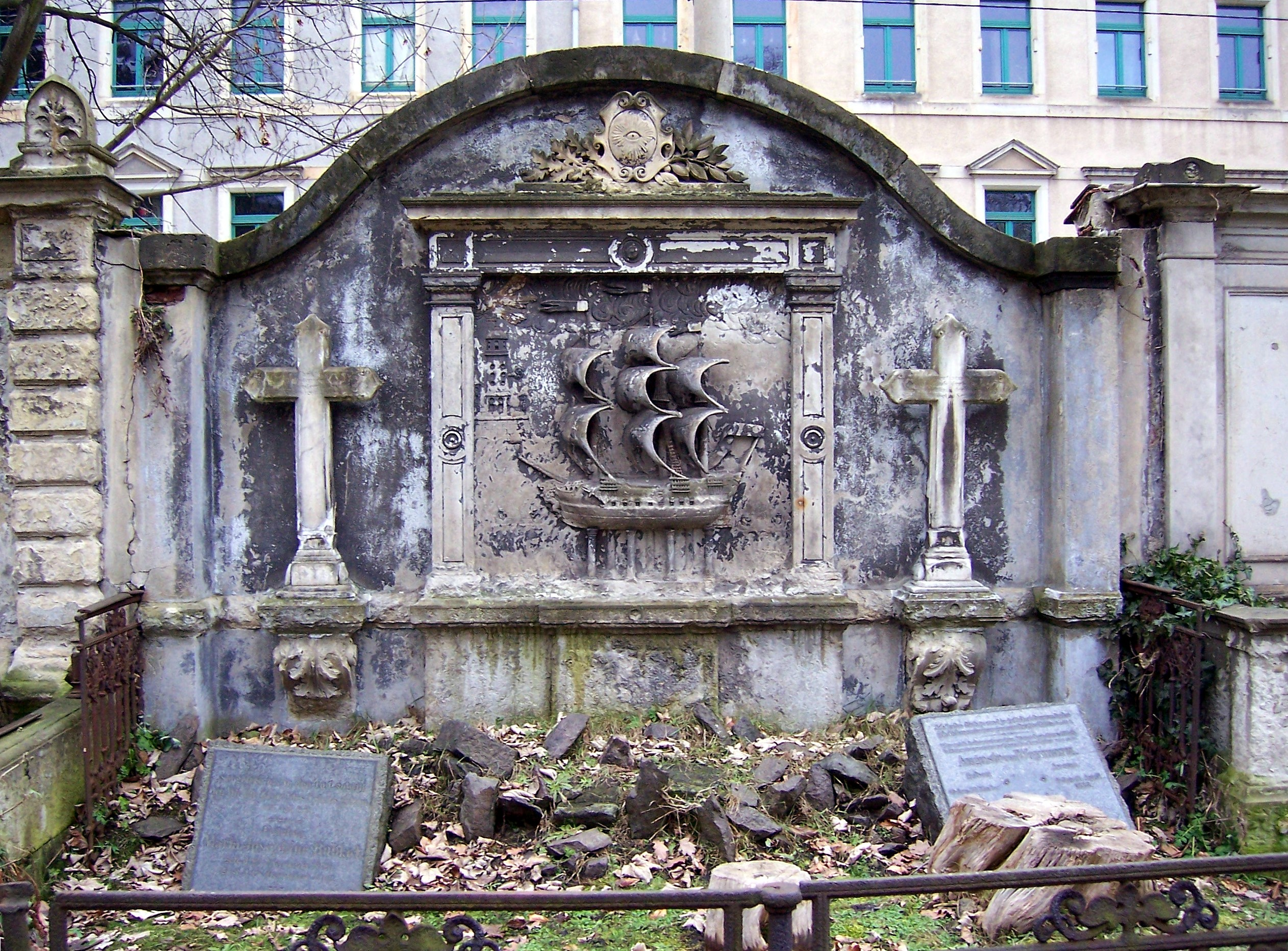 Grab von Wassili von Armstrong auf dem Inneren Neustädter Friedhof in Dresden.